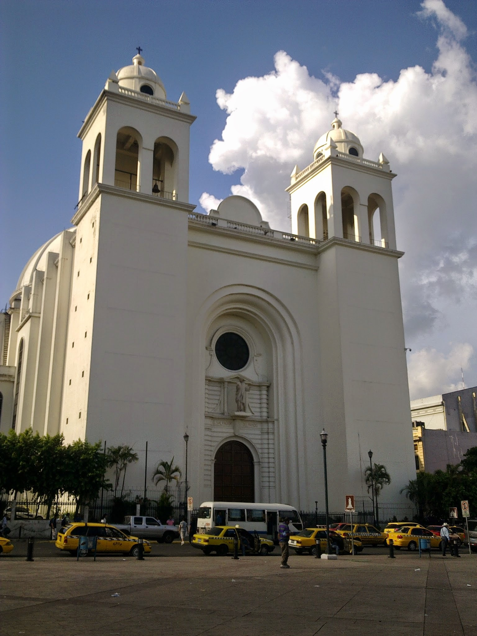 Fachada del principal templo católico de la ciudad de San Salvador, capital salvadoreña, sede del arzobispo metropolitano.